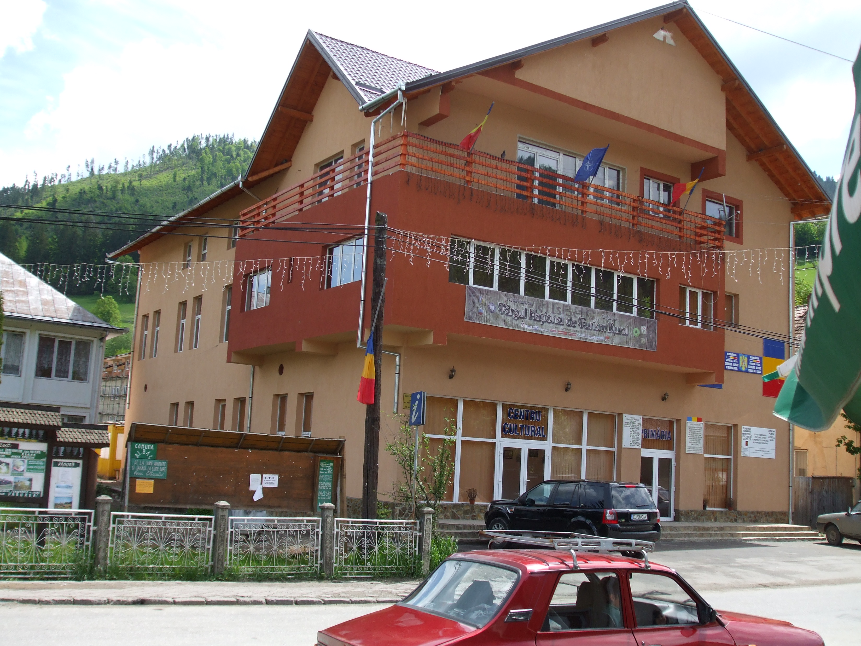 Primăria din comuna Albac, jud. Alba